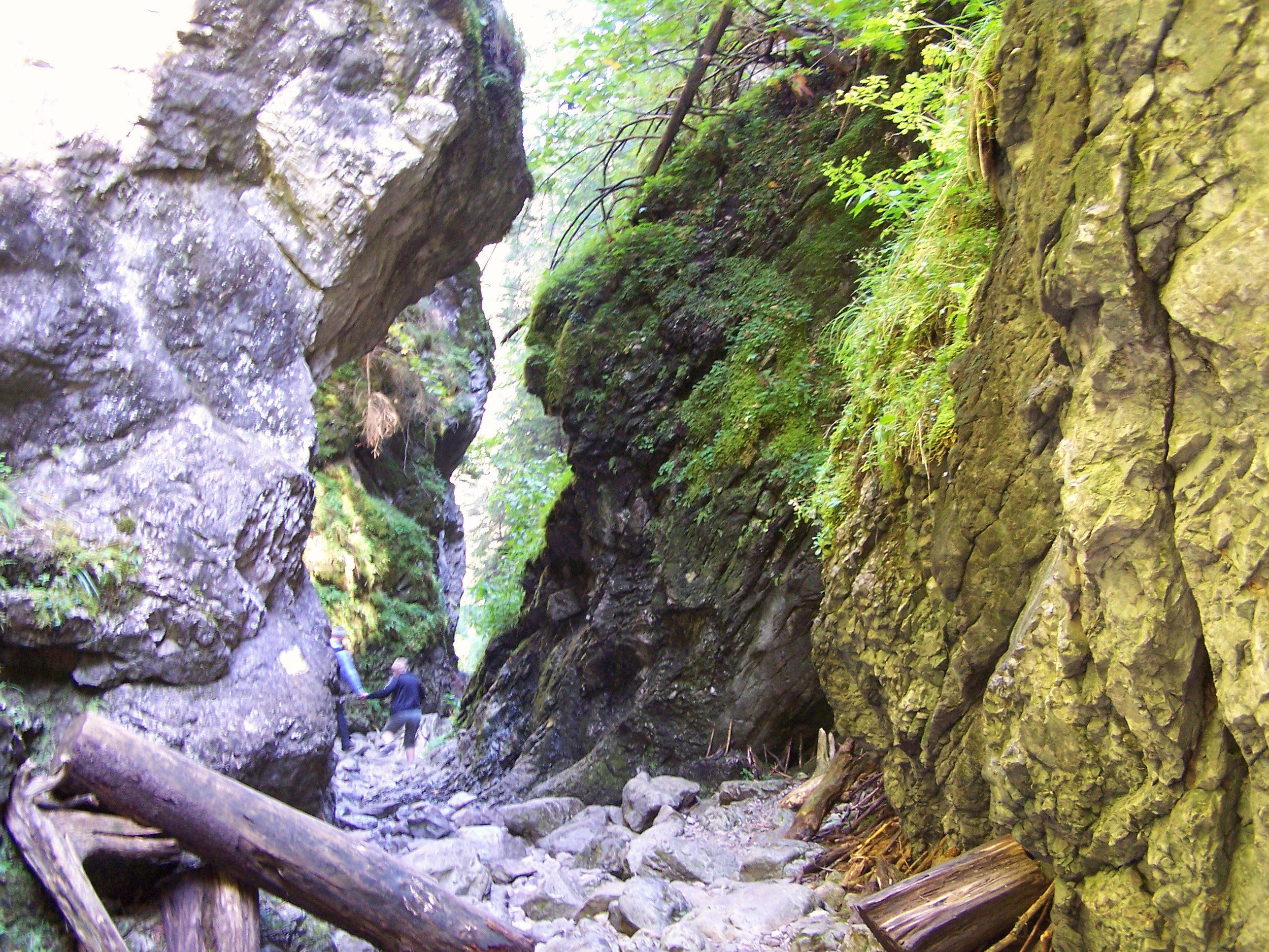 Wąwóz Kraków (Tatra Mountains, Dolina Kościeliska)